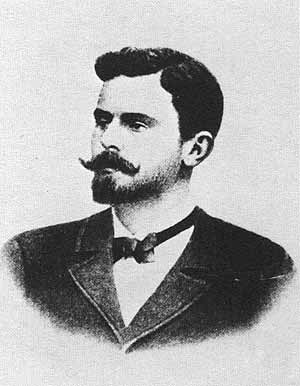 Dragotin Kette (1876—1899) Slovene poet